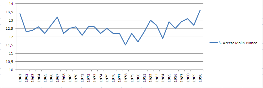 Stazione meteorologica di Arezzo Molin Bianco: andamento della temperatura media annua dal 1961 al 1990